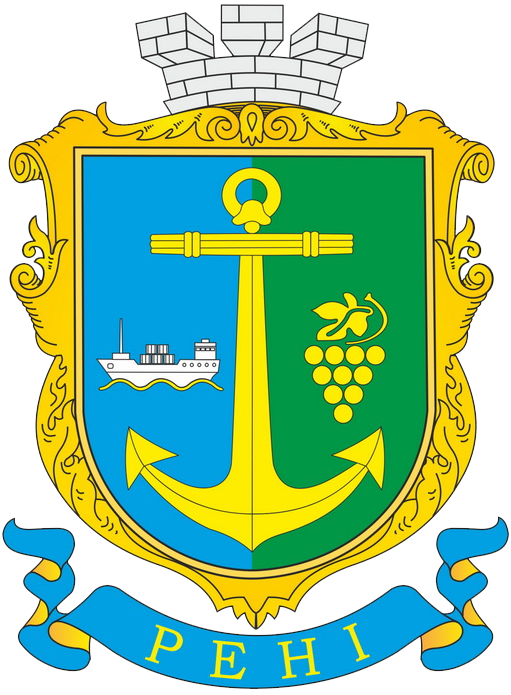 Герб Рені